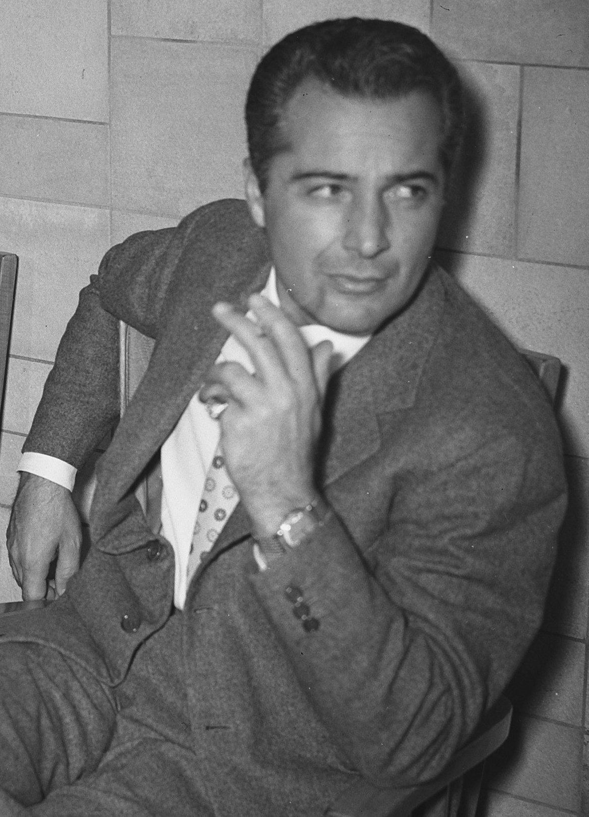 Collectie / Archief : Fotocollectie Anefo Reportage / Serie : [ onbekend ] Beschrijving : Aankomst Italiaanse filmsterren Milly Vitale (links, van de film "Le due orfanelle") en Rossano Brazzi (van de film "Three coins in the Fountain") Datum : 17 november 1954 Locatie : Noord-Holland, Schiphol Trefwoorden : filmsterren Persoonsnaam : Brazzi Rossano, Vitale Milly Fotograaf : Bilsen, Joop van / Anefo Auteursrechthebbende : Nationaal Archief Materiaalsoort : Glasnegatief Nummer archiefinventaris : bekijk toegang 2.24.01.09 Bestanddeelnummer : 906-8498